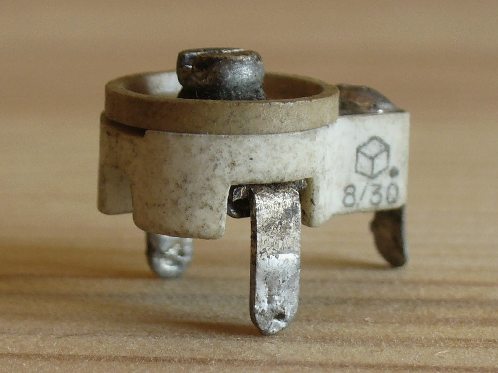 Керамический подстроечный конденсатор